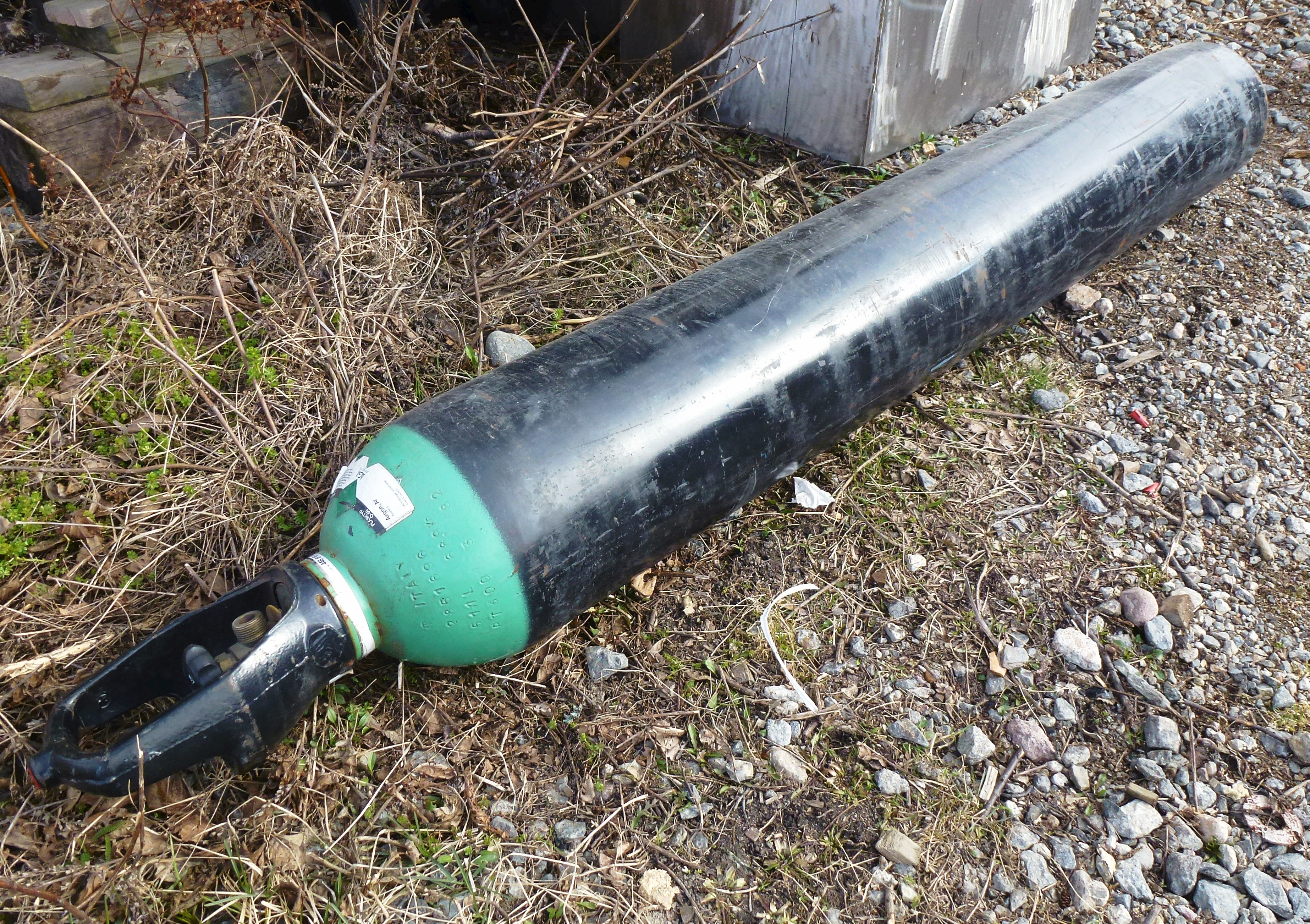 En gastub